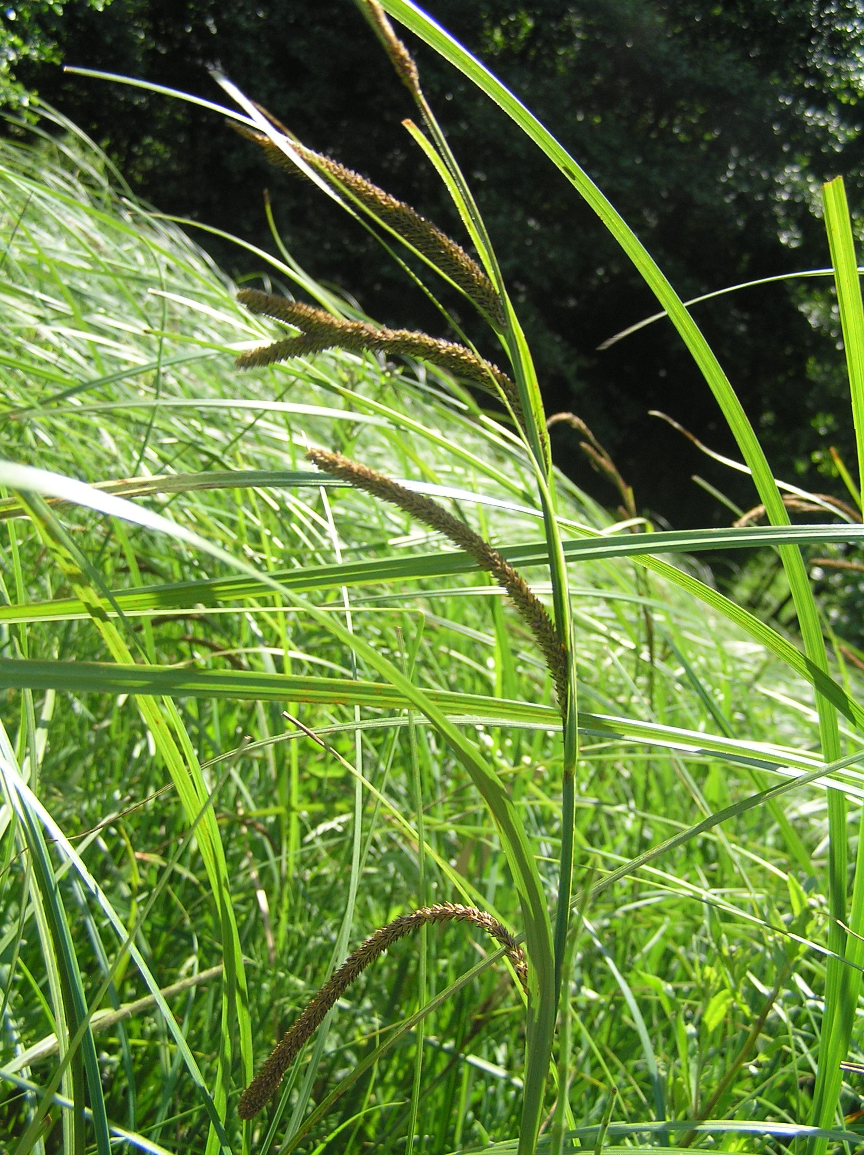 Carex acuta (C. gracilis), Jezernice, Czech Republik